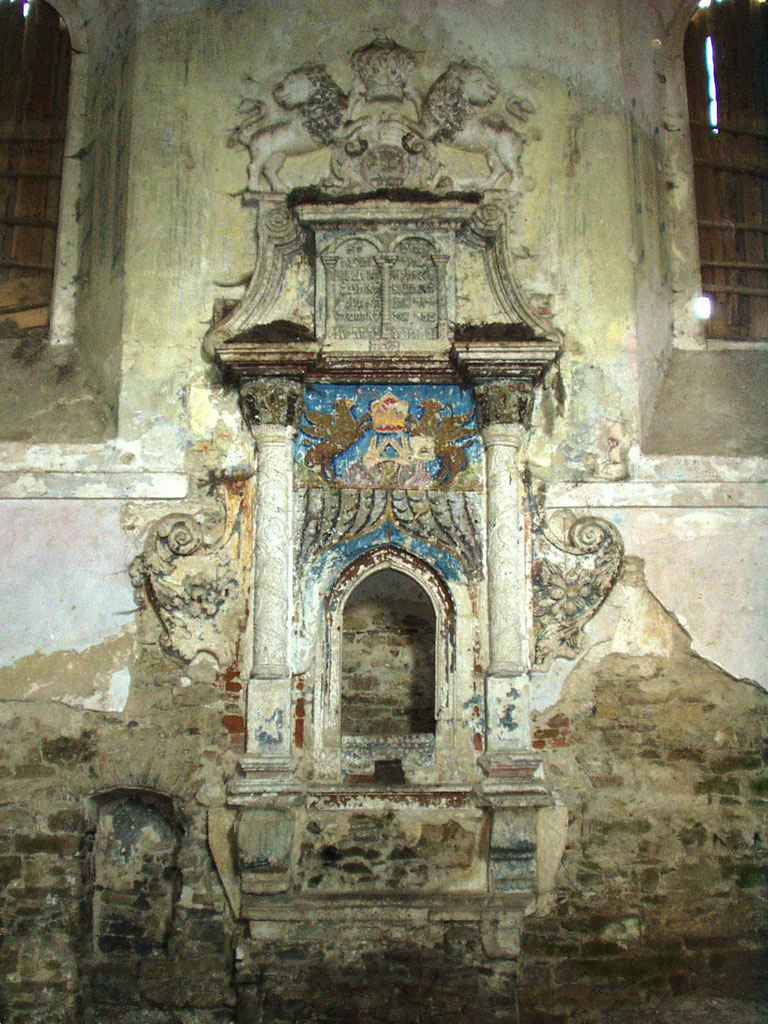 Сатанівська синагога.